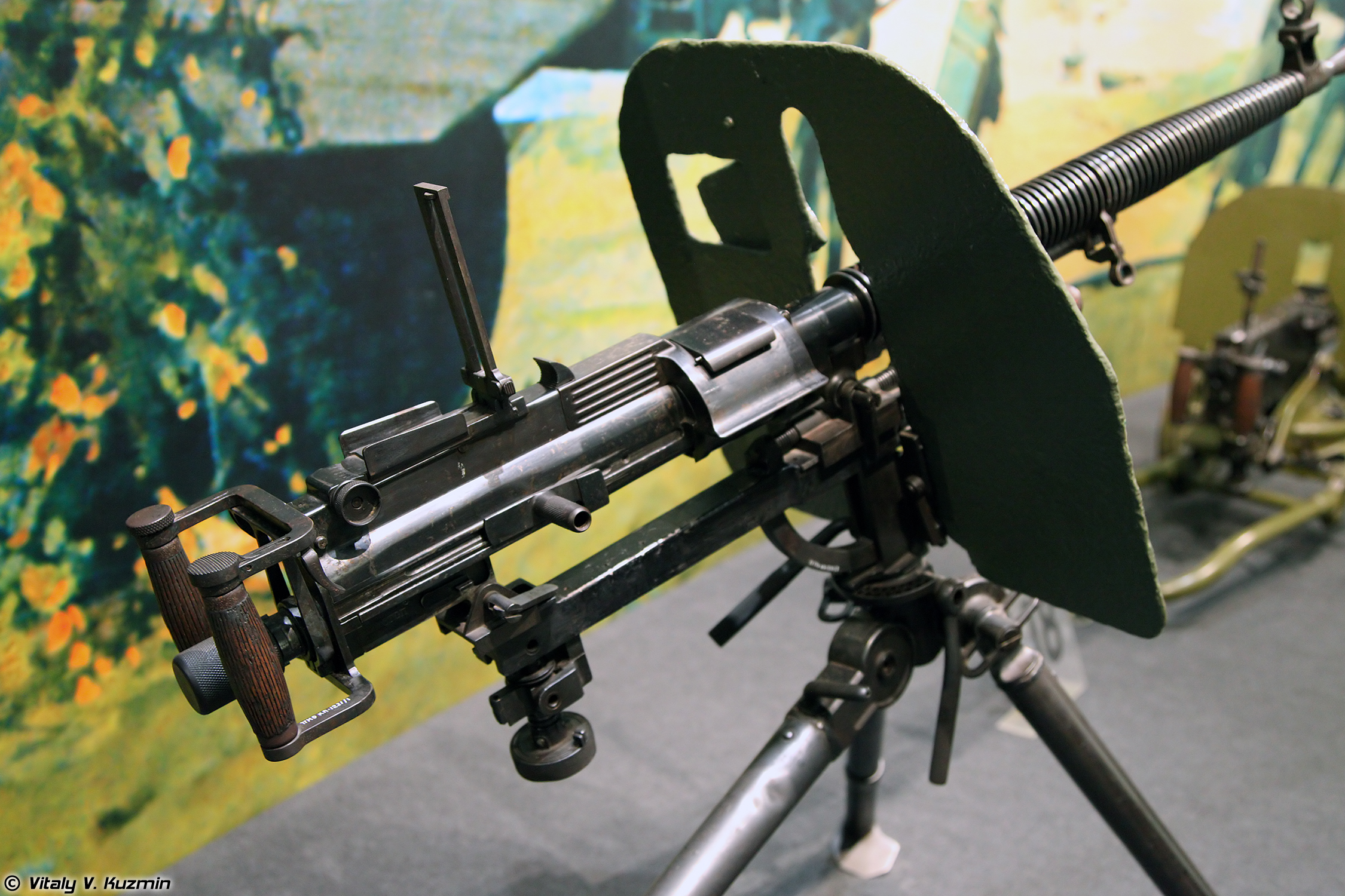 Станковый пулемёт Дегтярёва образца 1939 года ДС-39